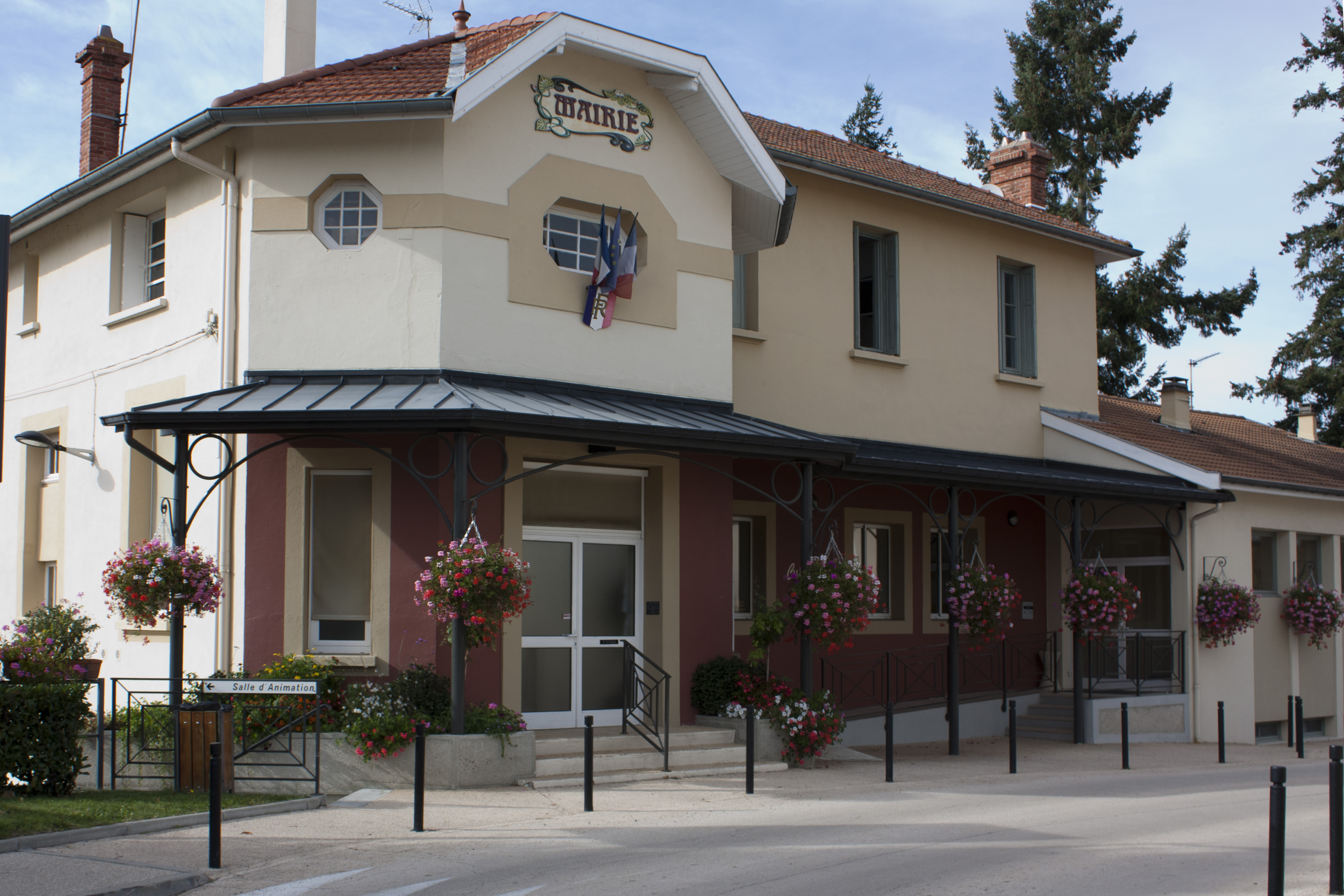 Mairie de Chambœuf (loire)